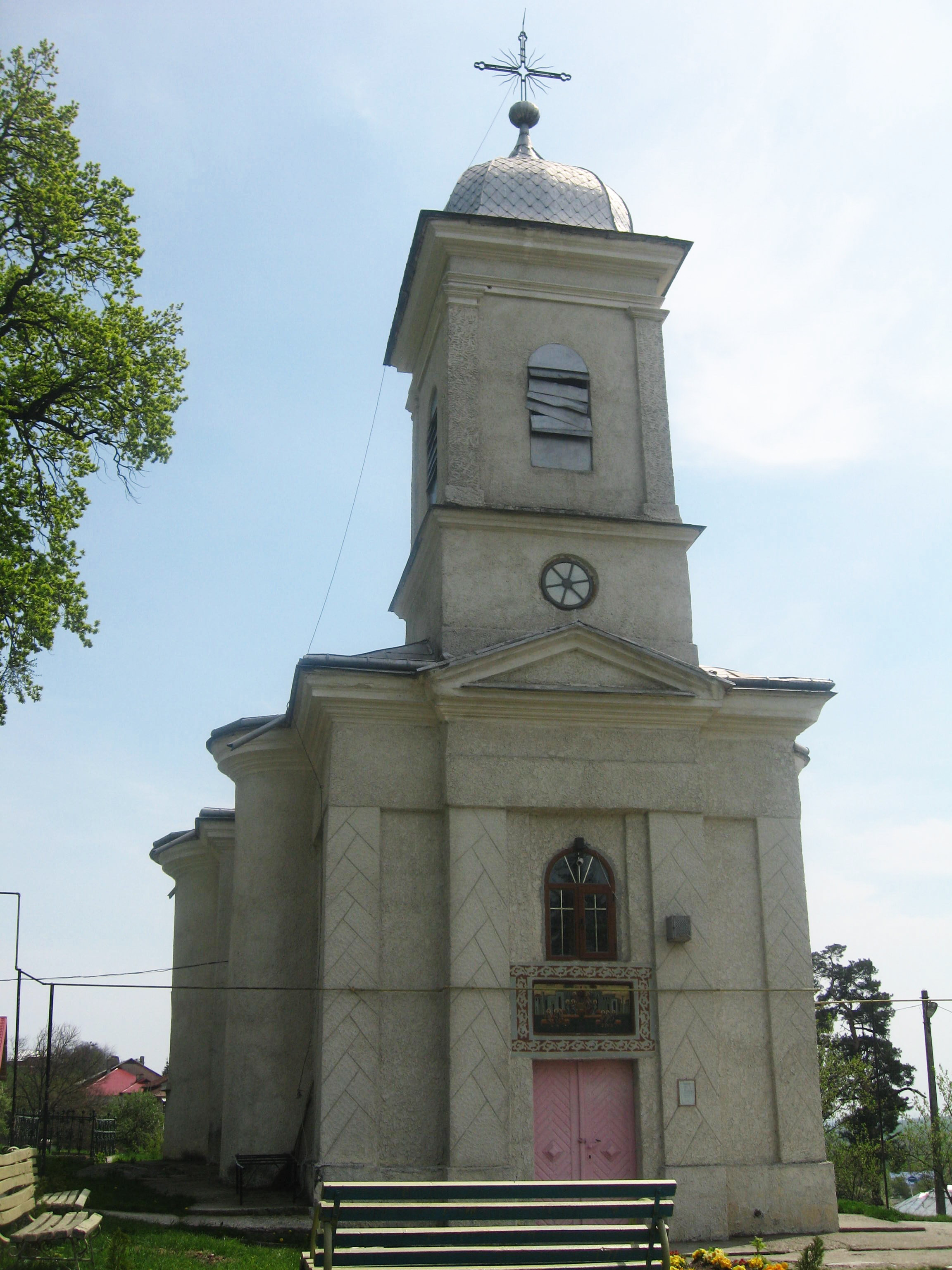 Biserica Pogorarea Sf. Duh din Dulcesti